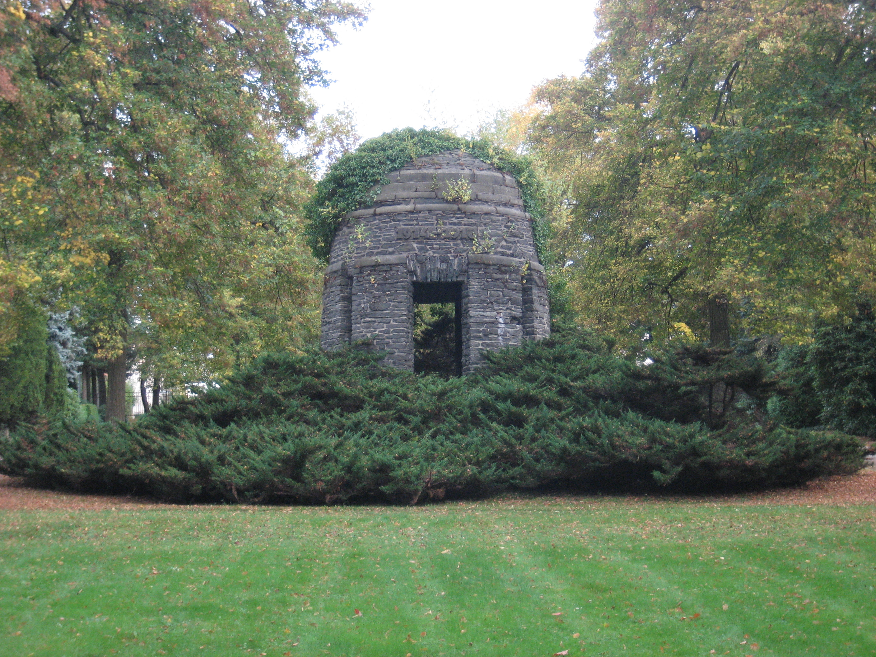 Ehrenmal für die im Ersten Weltkrieg gefallenen Angehörigen des (5. Königlich Sächsischen) Infanterie-Regiments Nr. 104 „Kronprinz“ auf dem Städtischen Friedhof Chemnitz